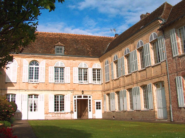 Hôtel de La Barre de Nanteuil au Petit-Andely - Façade sur cour d’époque Louis XVI (1754-1793) - 33, rue Grande aux Andelys - Renommé par Mme Bernadette Mennesson. Cf. [1]